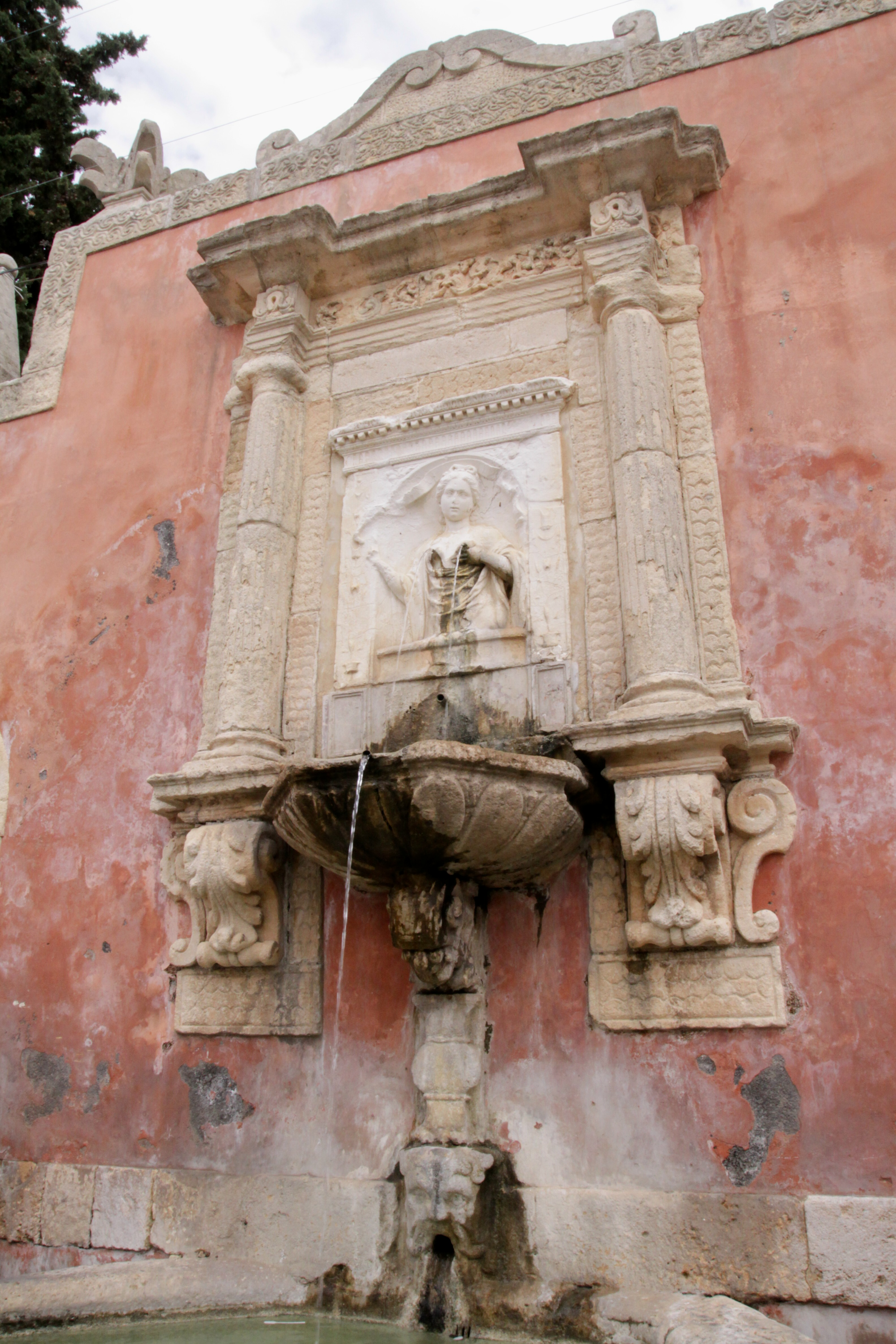 Particolare della fontana della ninfa Zizza (1607) all'interno dell'atrio del castello di Militello in Val di Catania.